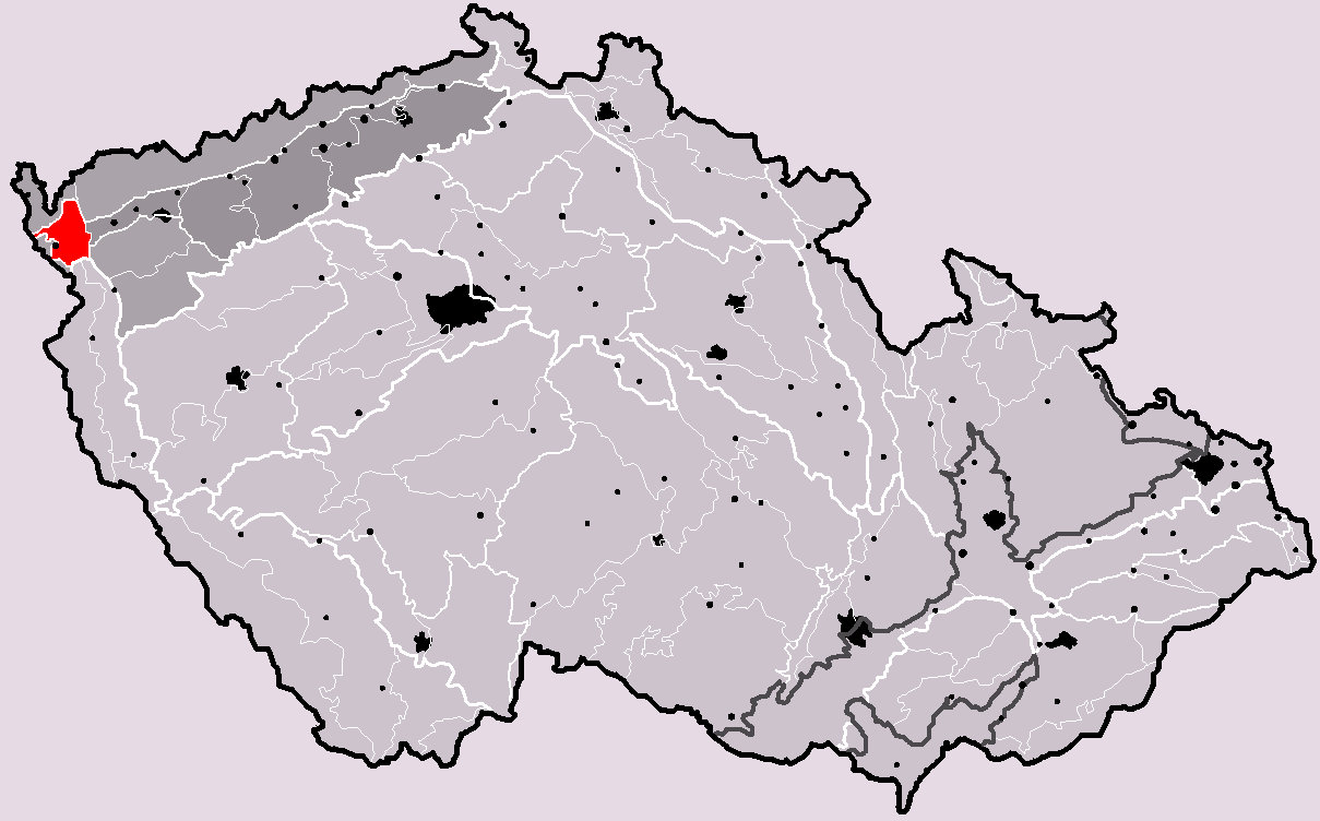 Poloha geomorfologického celku Chebská pánev v rámci České republiky. Hercynský systém Hercynská pohoří I Česká vysočina I3 (III) Krušnohorská subprovincie I3B (IIIB) Podkrušnohorská oblast I3B-1 (IIIB-1) Chebská pánev